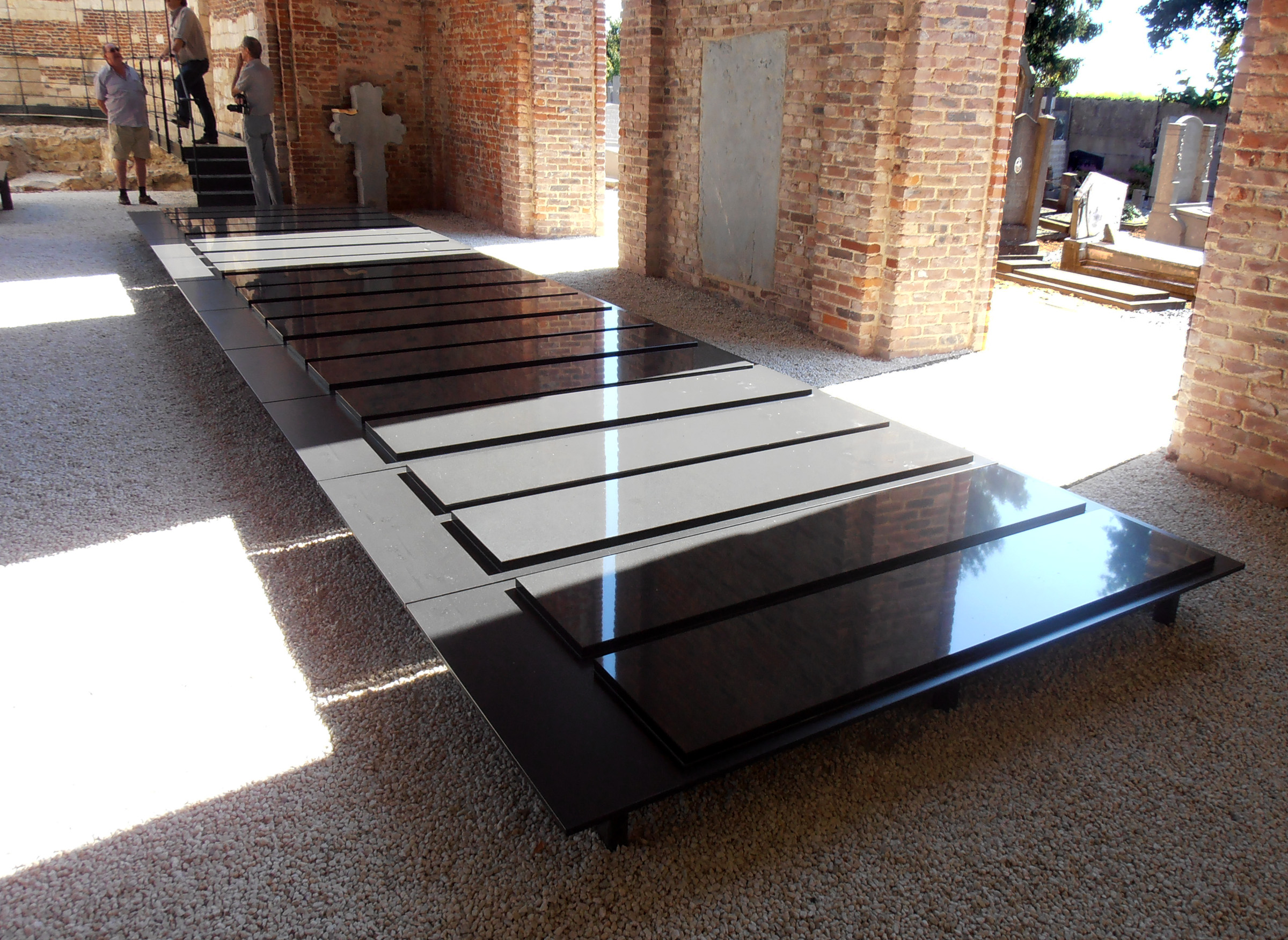 Voormalige Sint-Rochuskerk in Ulbeek (gemeente Wellen).Gerestaureerd en gerenoveerd tot ovedrekte begraafplaats. Vlaamse monumentenprijs 2012. Vooraf geconstrueerde grafzerken in het middenschip van de voormalige kerk.